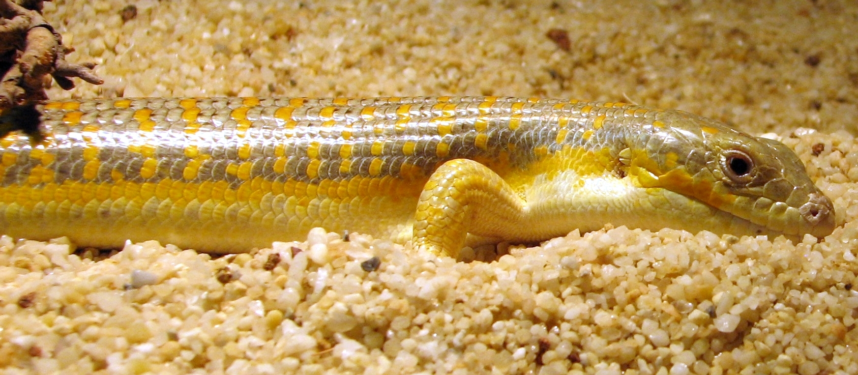 Schneider's skink - (Novoeumeces [Eumeces] schneideri)